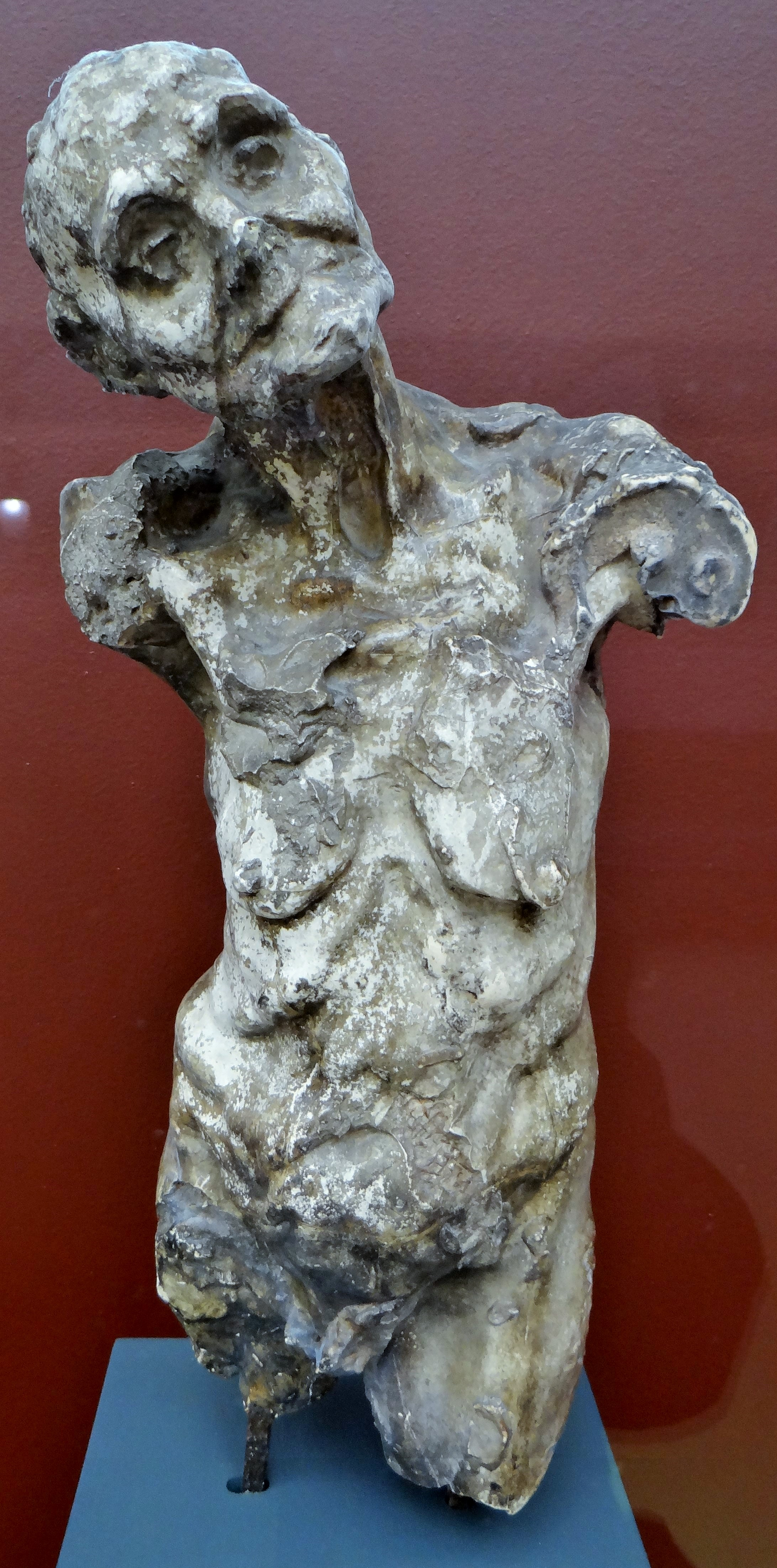 Torse de Clotho, vers 1893, torse, modèle en plâtre tiré d'un moule à bon creux, Camille Claudel